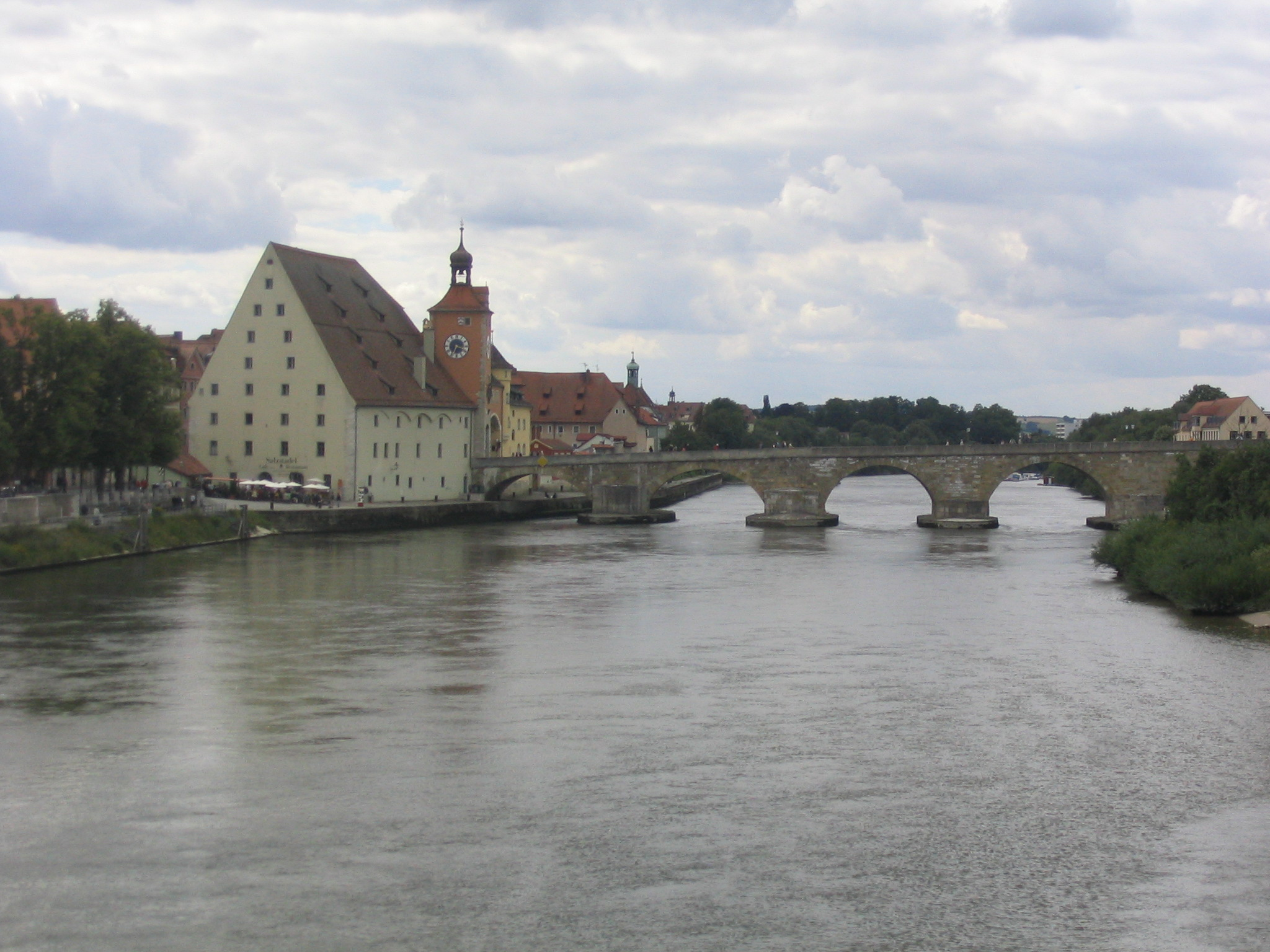 Salzstadl in Regensburg. Aufgenommen am 30.07.2007 von Dr. Hagen Graebner